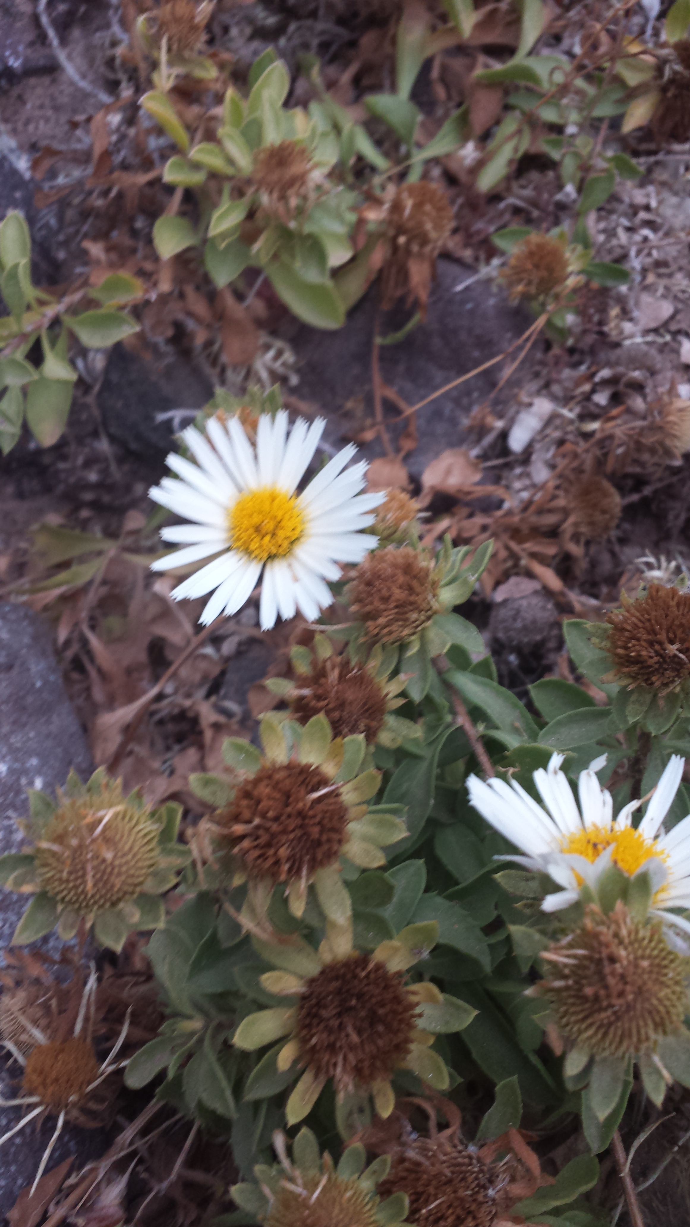 Ejemplar de Asteriscus schultzii en floración